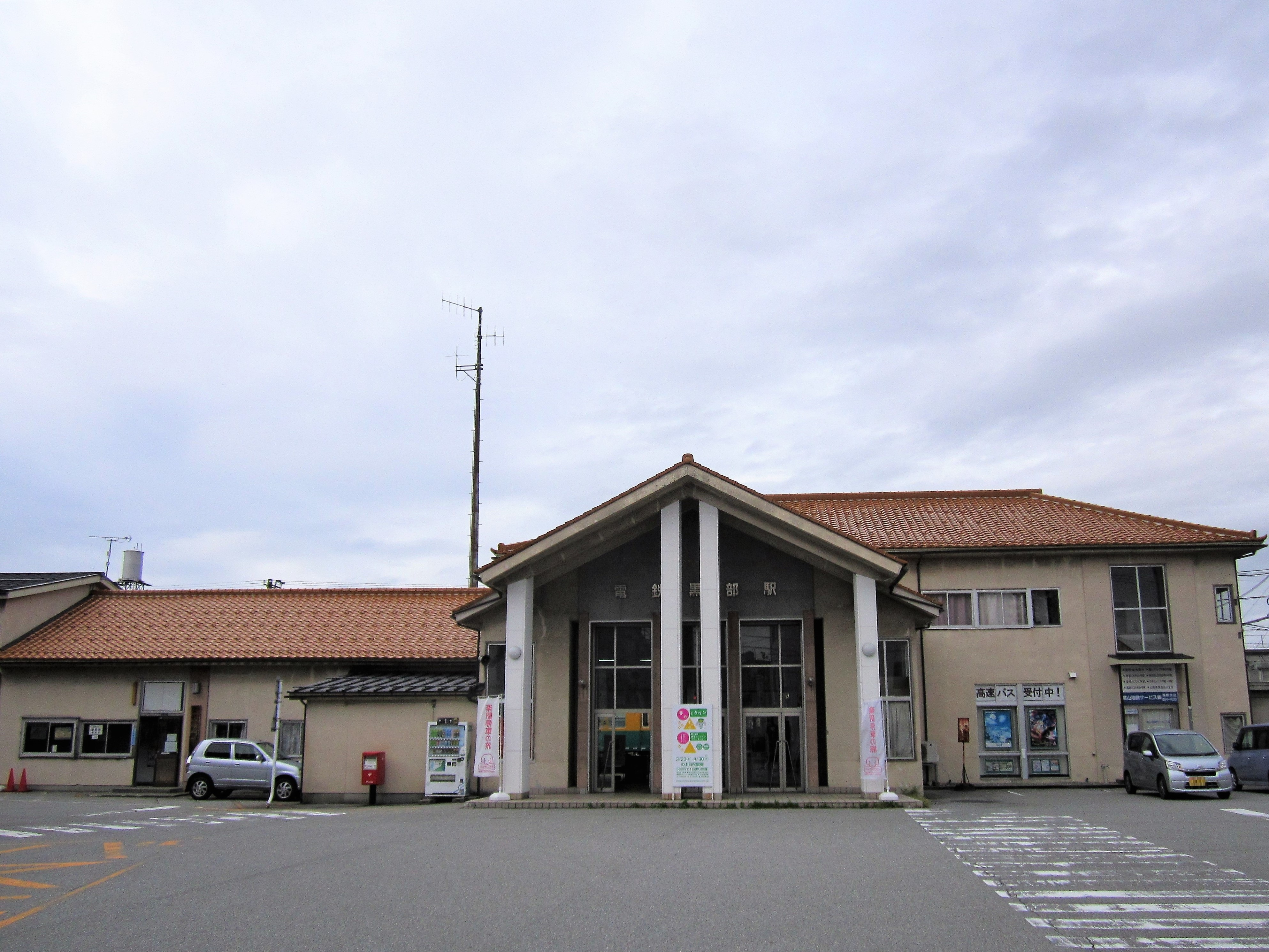 富山地方鉄道 電鉄黒部駅